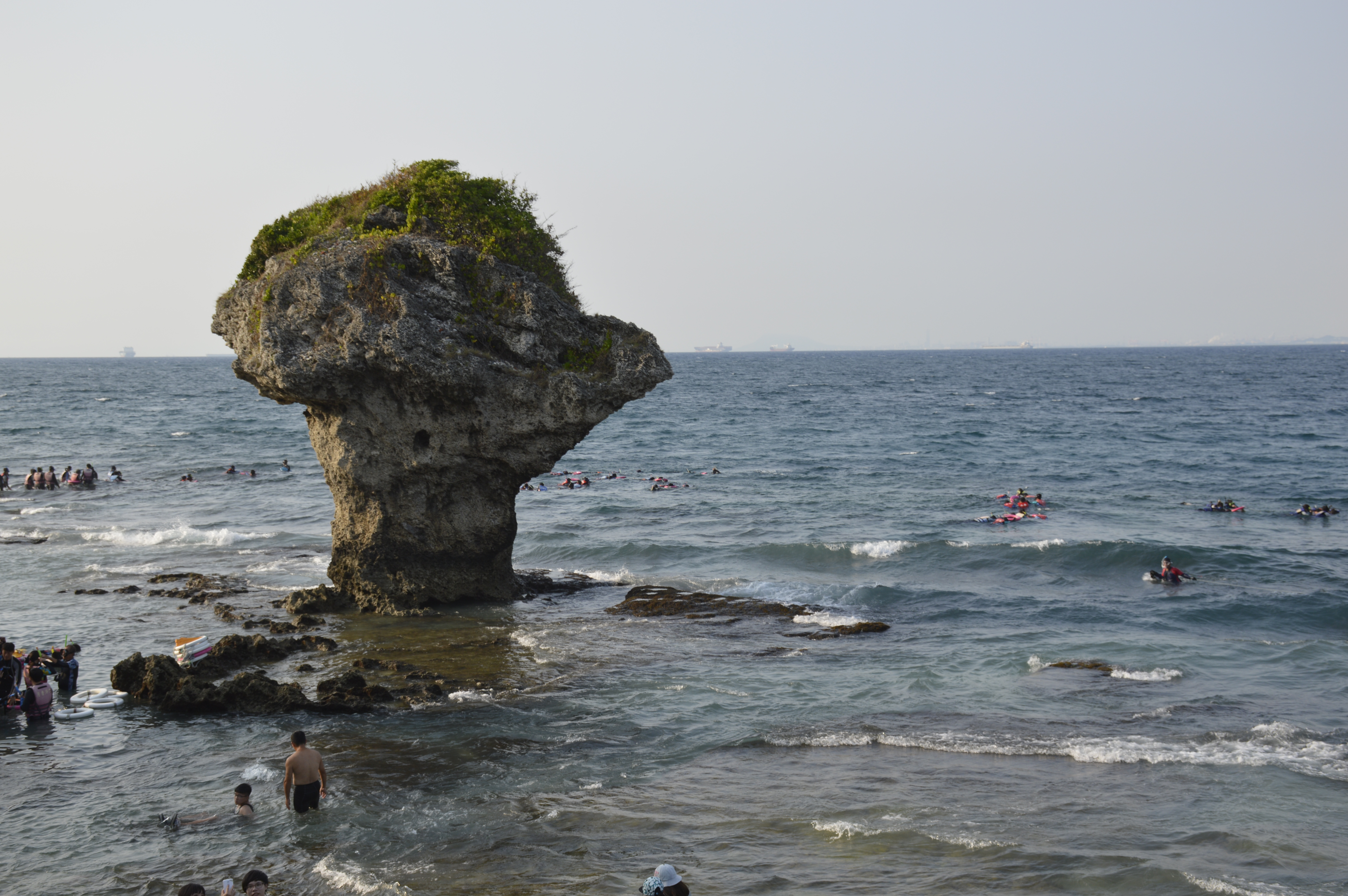 2015年10月9日拍攝的琉球鄉花瓶石